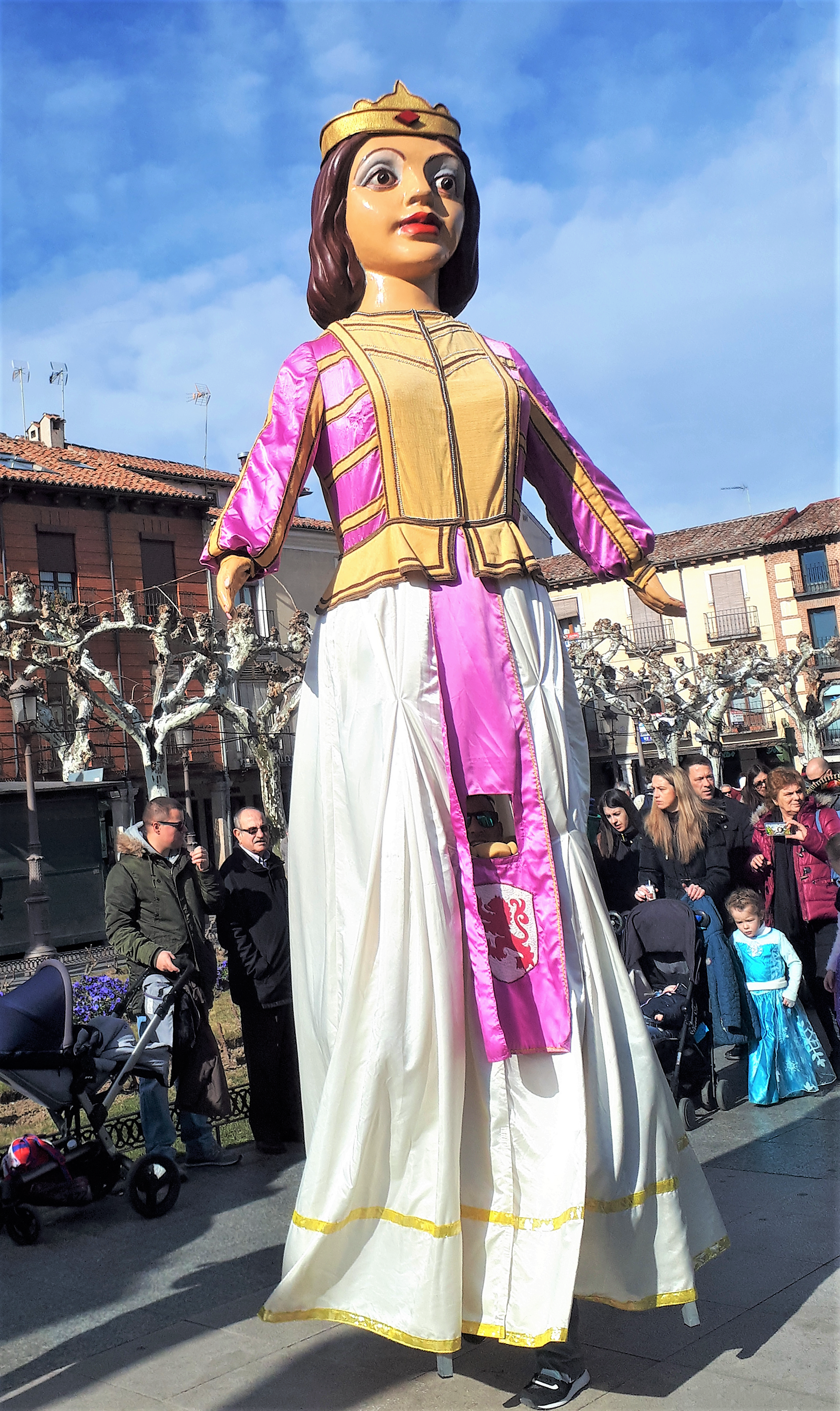 Gigante "La Duquesa" de la Comparsa Cervantina de Alcalá de Henares (Comunidad de Madrid - España). La Duquesa es un personaje del libro Don Quijote de la Mancha. Fotografía tomada en la plaza de Cervantes el 11 de febrero de 2018.